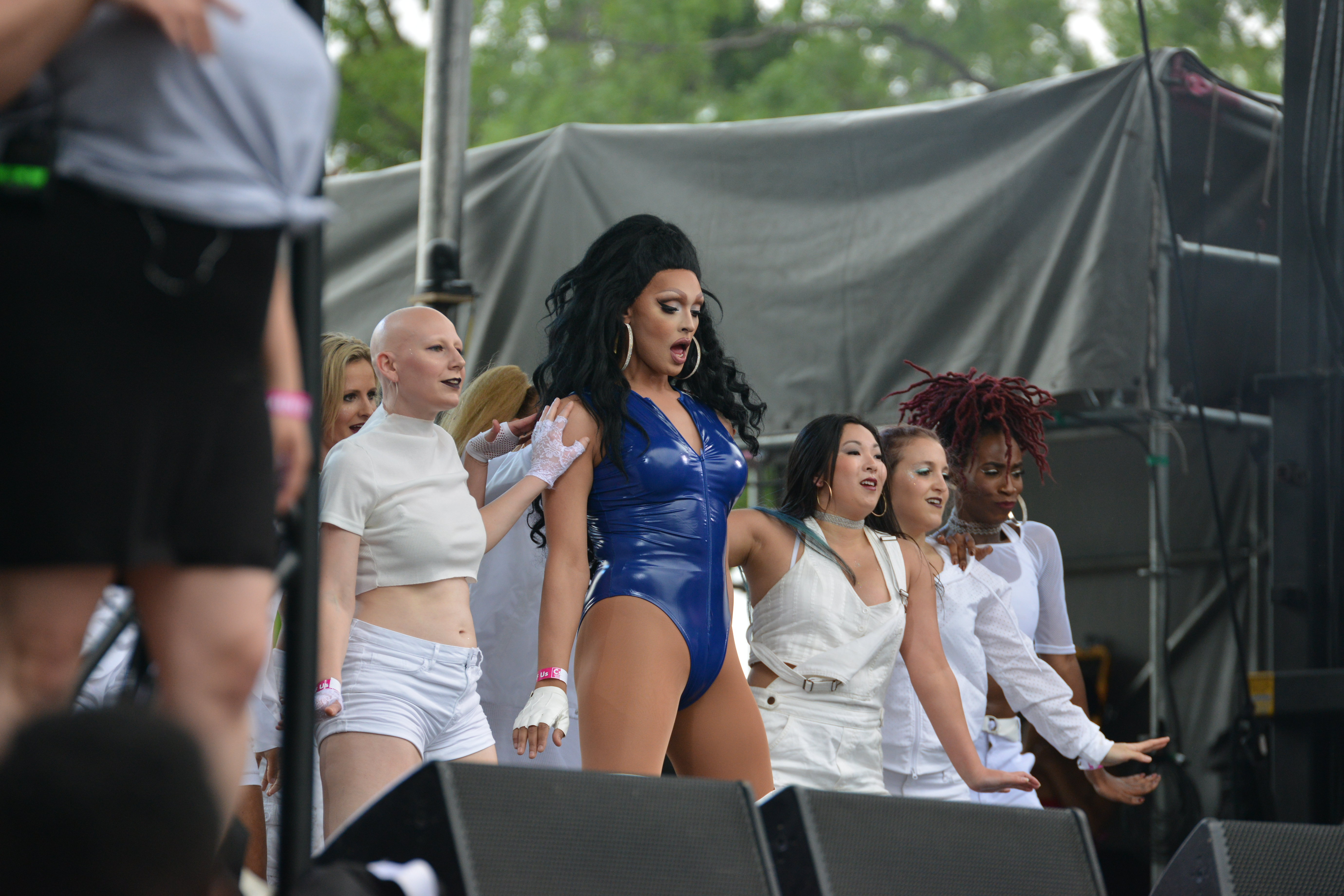 Capital Pride Festival DC 2018